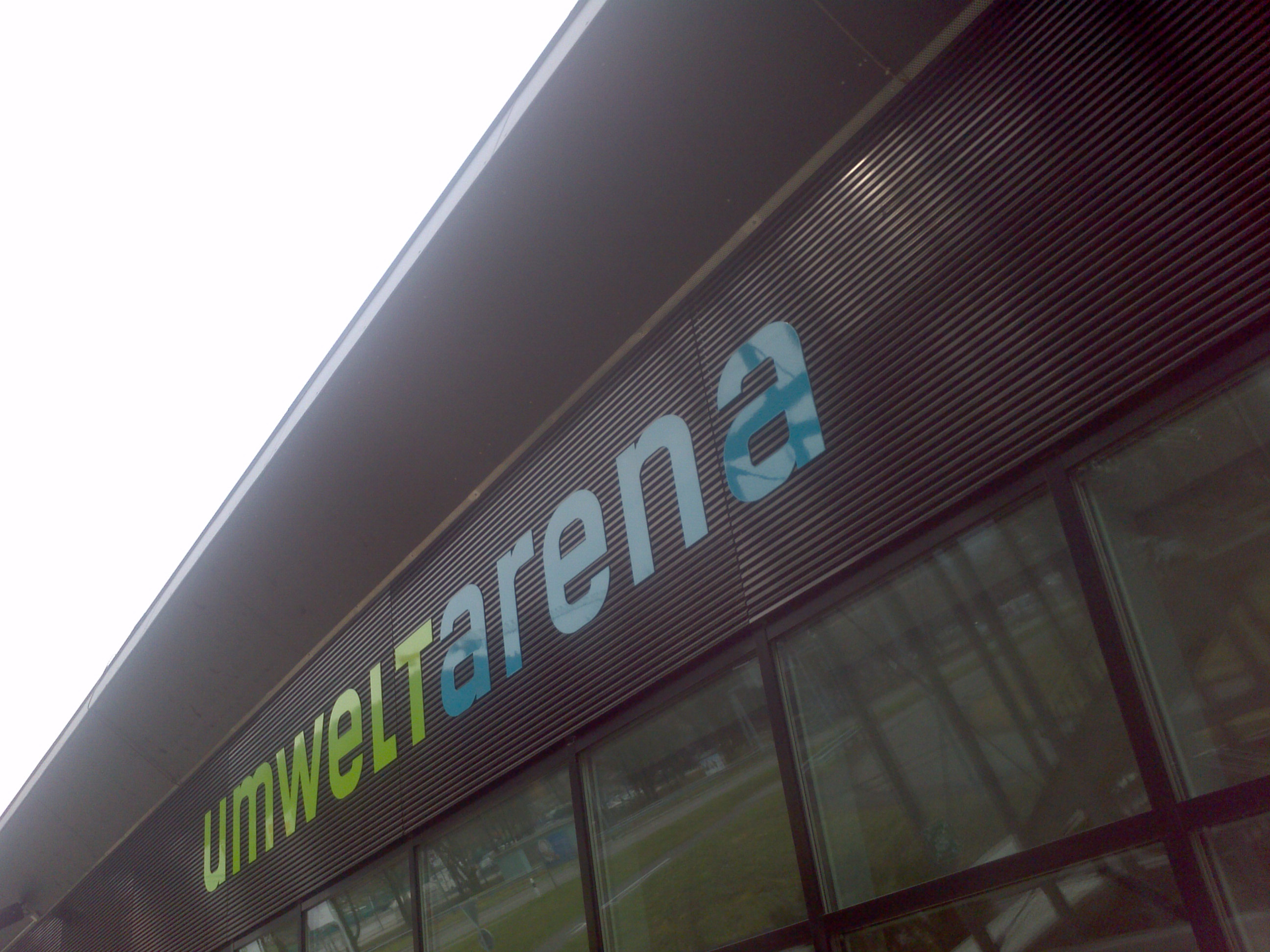 umweltarena, Spreitenbach, Schriftzug am Sims